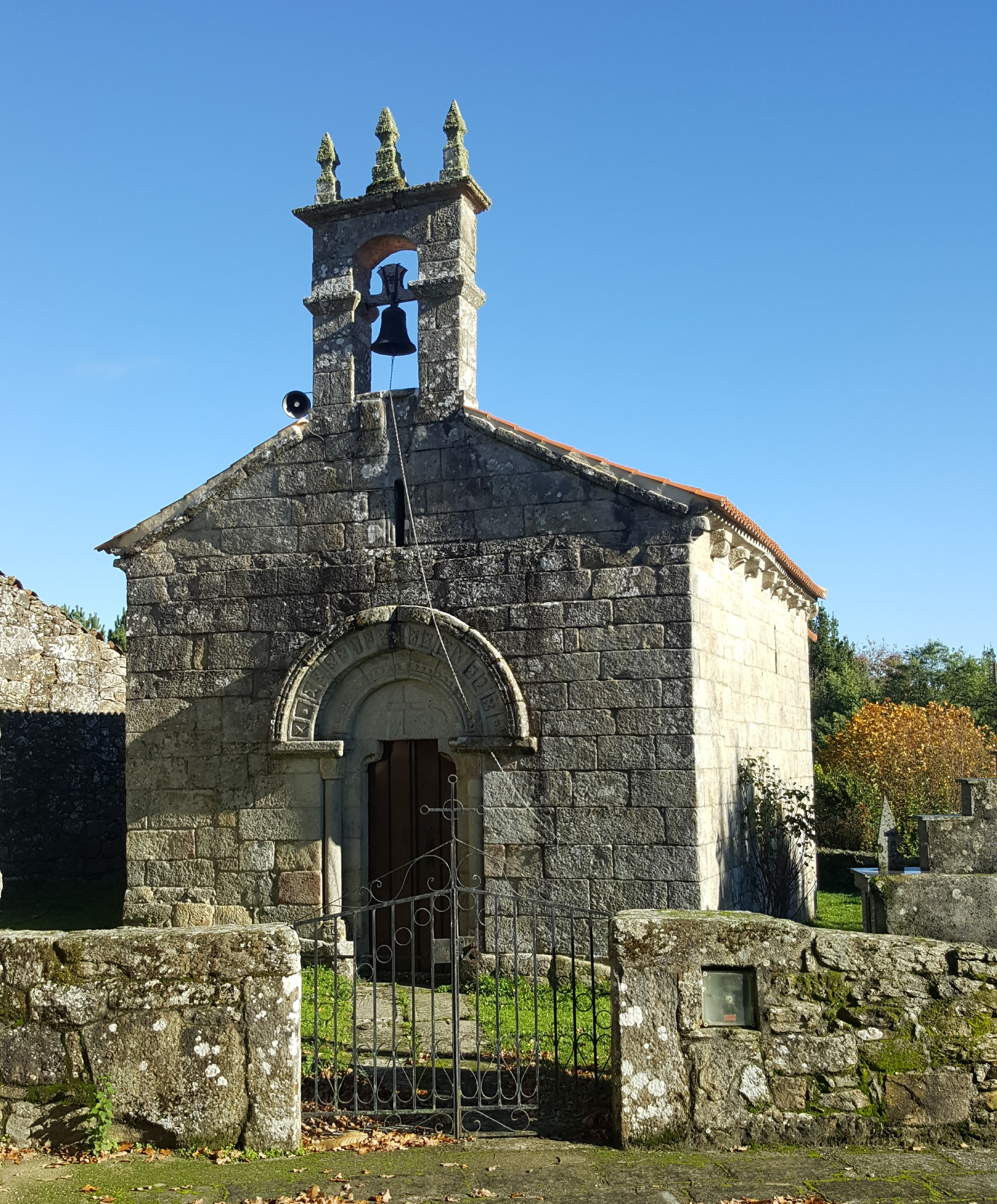 Igrexa Parroquial de Vilanuñe (Antas de Ulla)